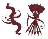 Yugo y haz de flechas. Emblema de los Reyes Católicos